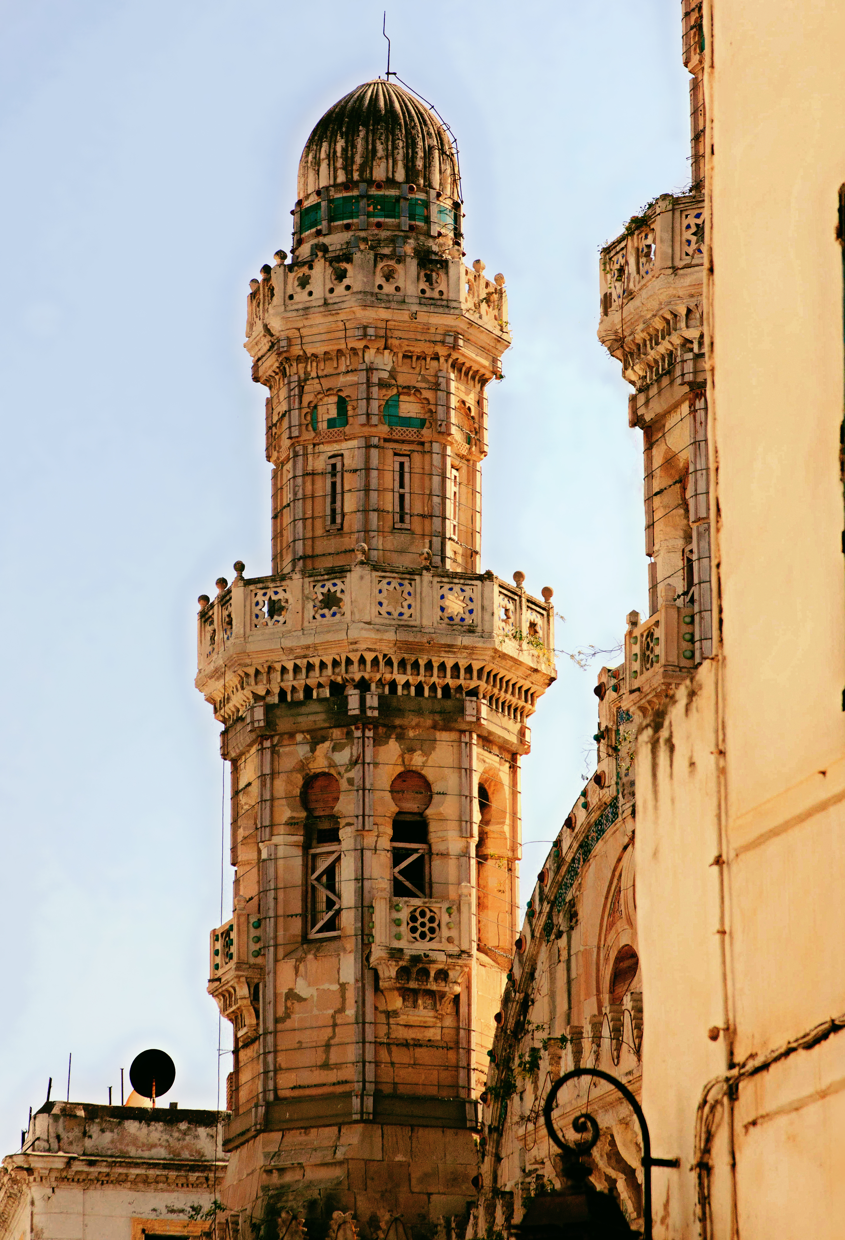 Mosquée Ketchaoua,cette photo a ete prise l'or d'une viste guider a la Casbah